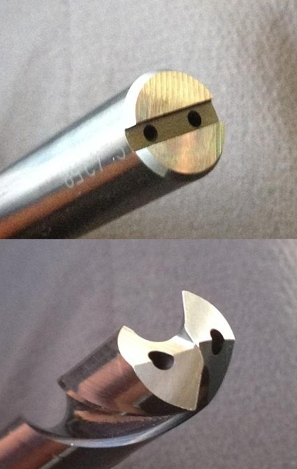 Spiralbohrer aus Hartmetall mit innerer Kühlschmiermittelzufuhr. Auf dem Bild die beiden Kanäle für das Kühlschmiermittel am Spannschaft des Bohrers (oben) und an der Spitze des Bohrers (unten).